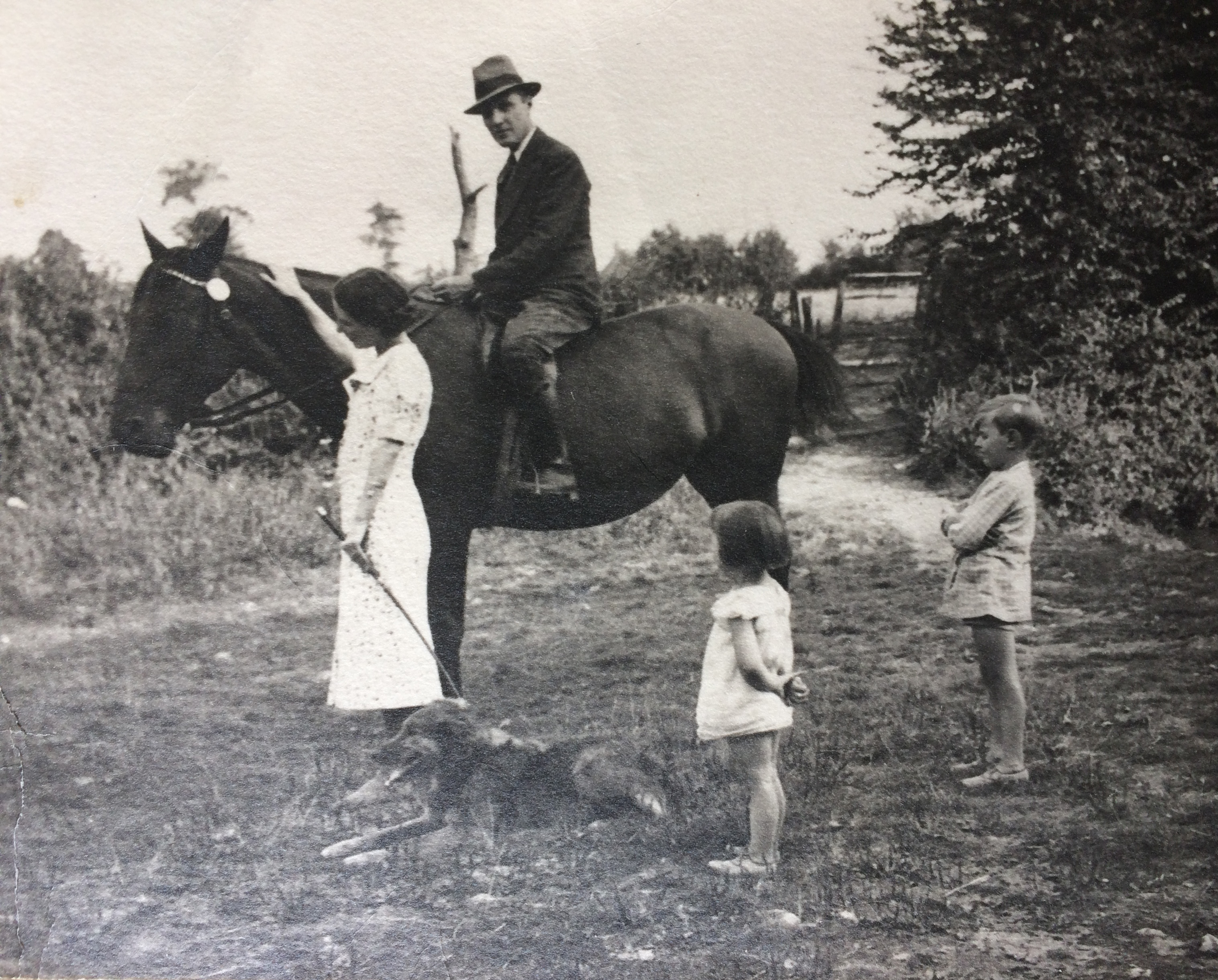 Gaston Pateau avec sa femme Suzanne, ses enfants Gérard et Nicole, ainsi que son cheval Liberté, à Combres en août 1937.